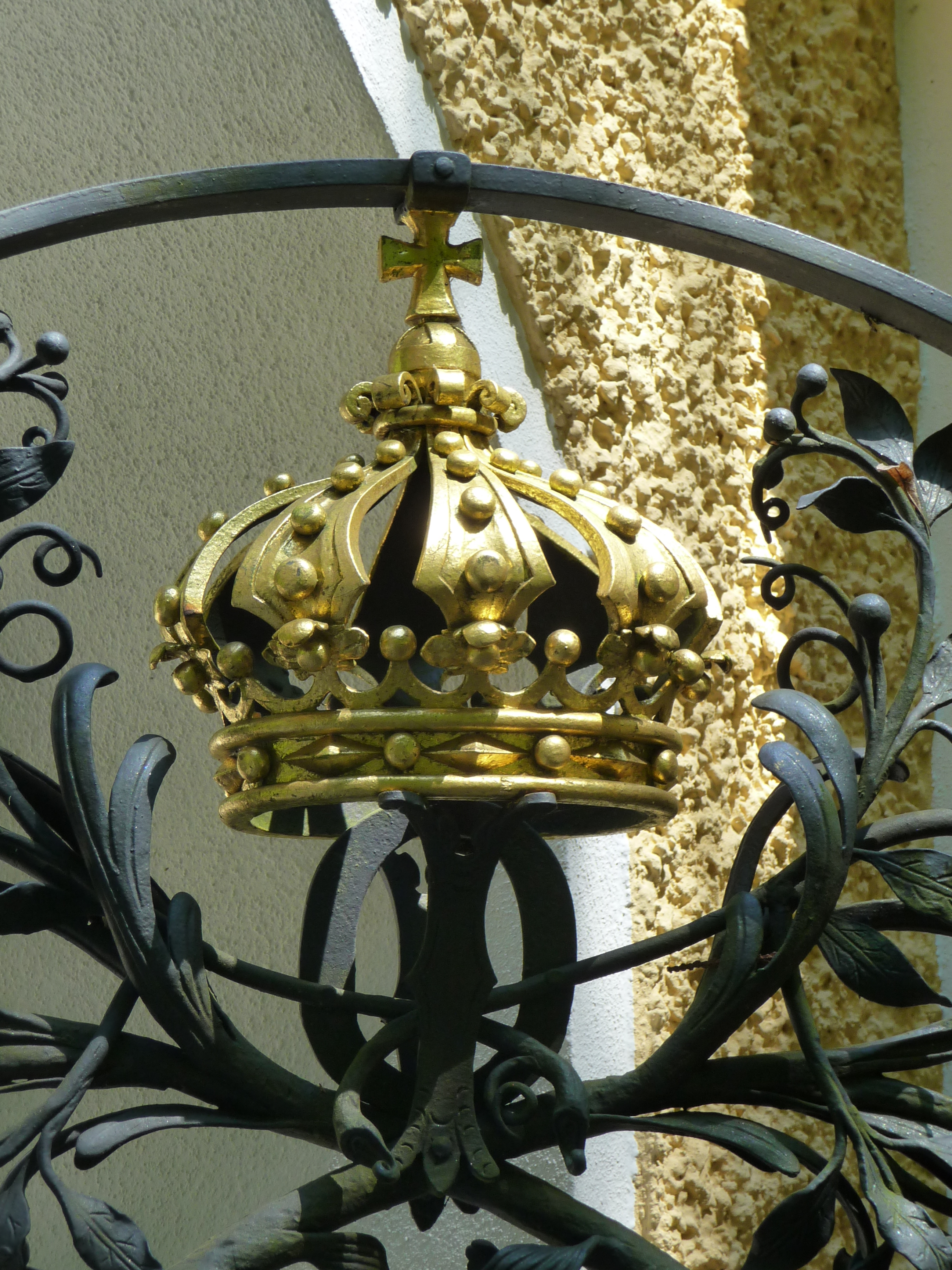 Das Seitentor wird als Hinweis auf König Otto von Bayern als ehemaligen Bewohner mit der Krone der bayerischen Könige geschmückt